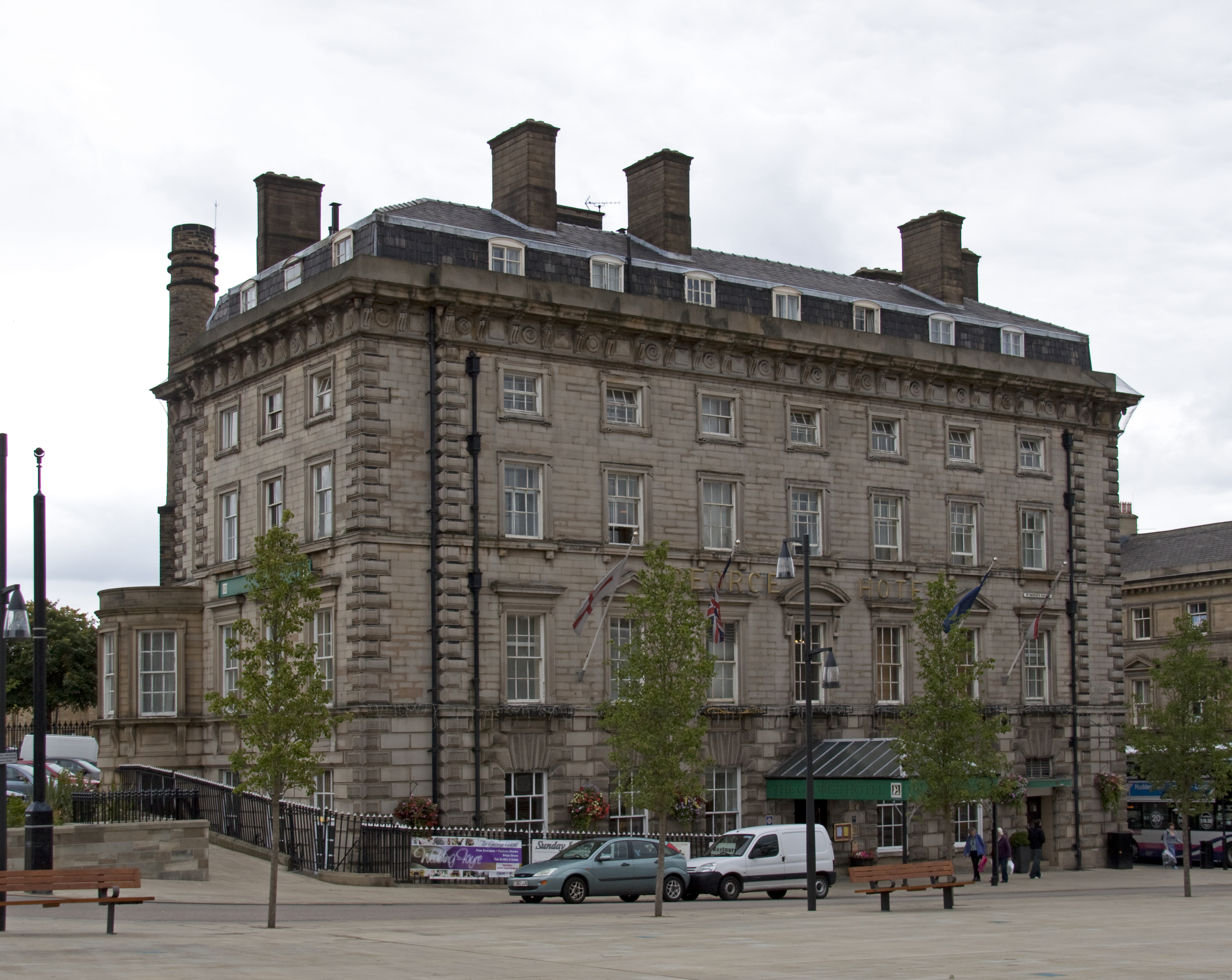 George Hotel